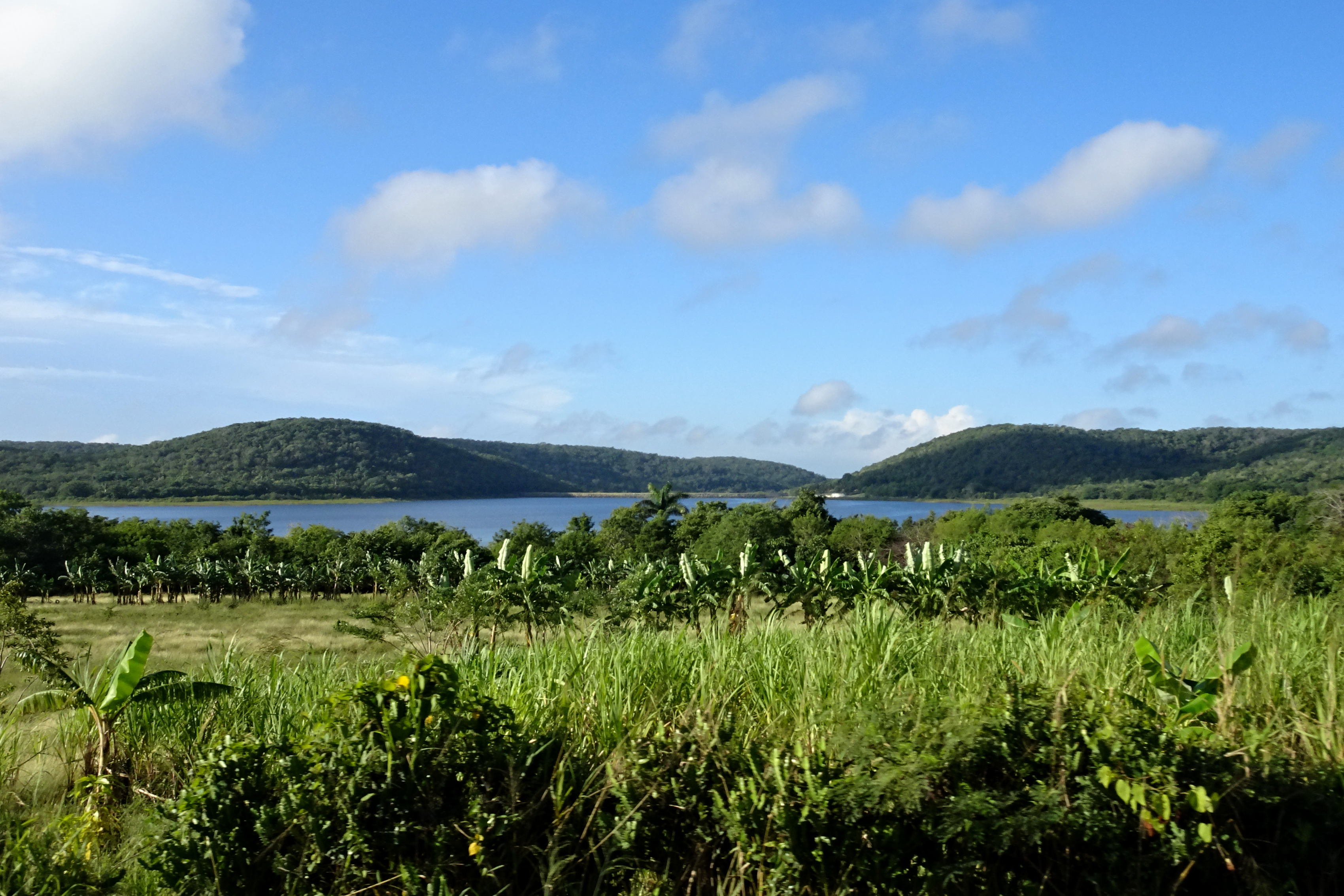 Camazán Reservoir, Báguanos, Holguin Province, Cuba